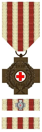 Herdenkingskruis 1939-1940 van het Nederlandse Rode Kruis in Brons. Twee batons, boven voor het zilveren kruis en onder voor het bronzen kruis